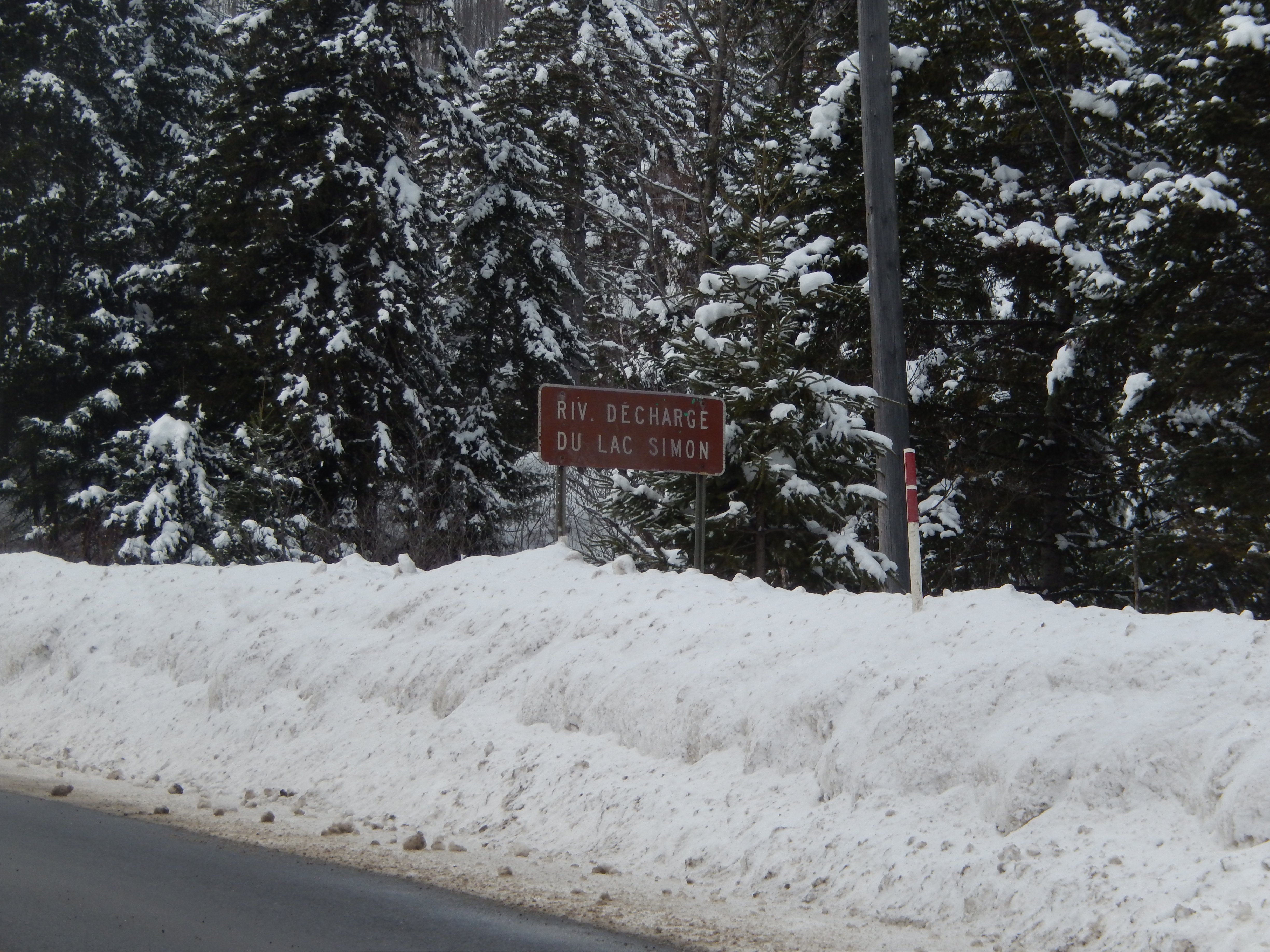 Panneau de la décharge du Lac Simon à Saint-Léonard-de-Portneuf.